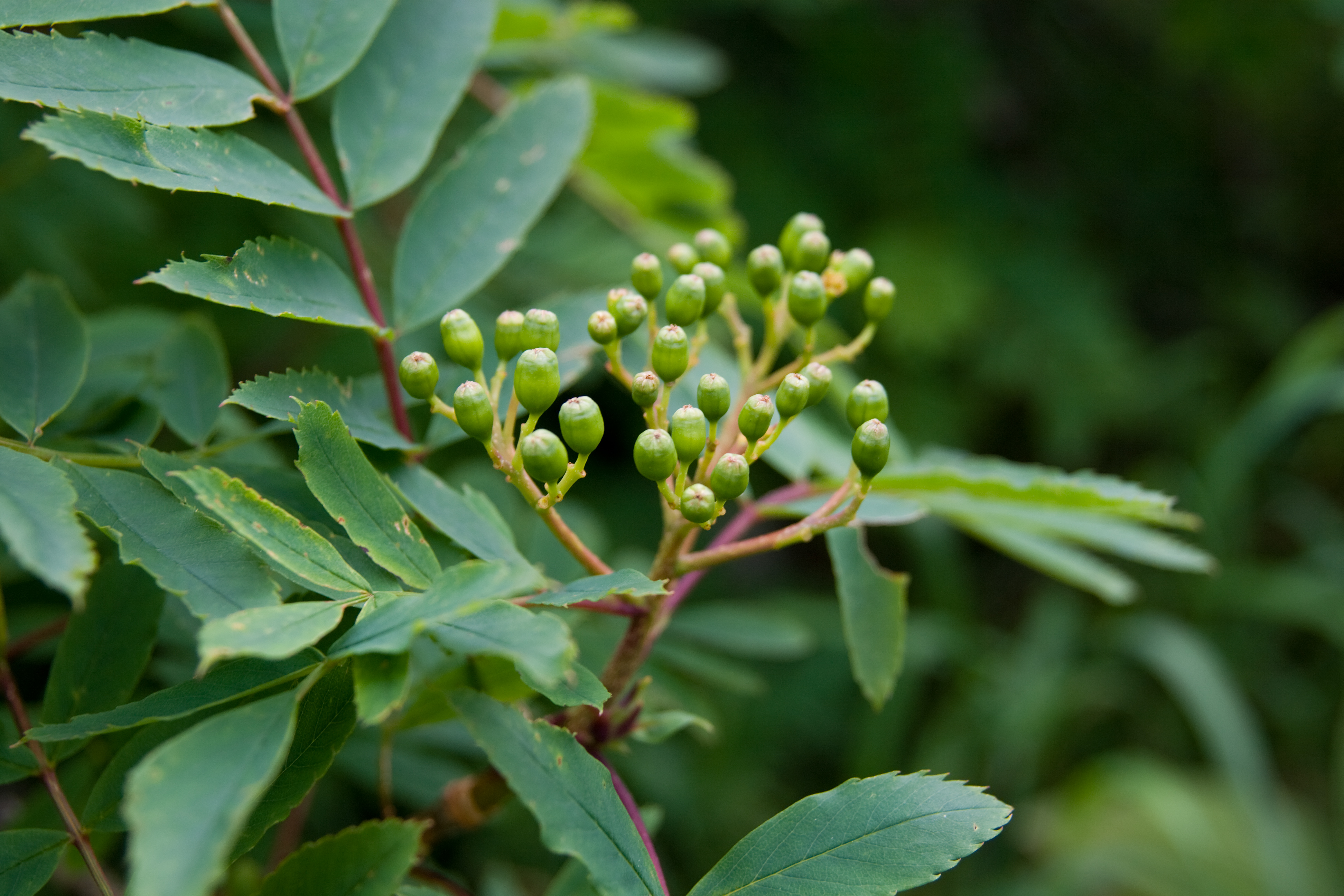 ウラジロナナカマド (学名:Sorbus matsumurana)